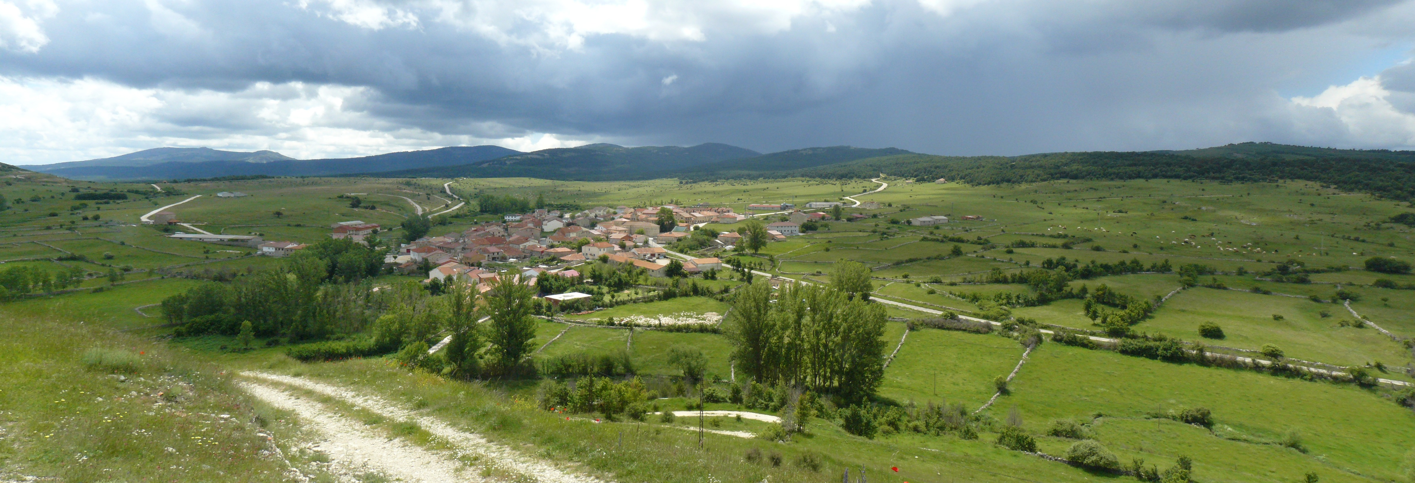 Galve de Sorbe, Guadalajara.